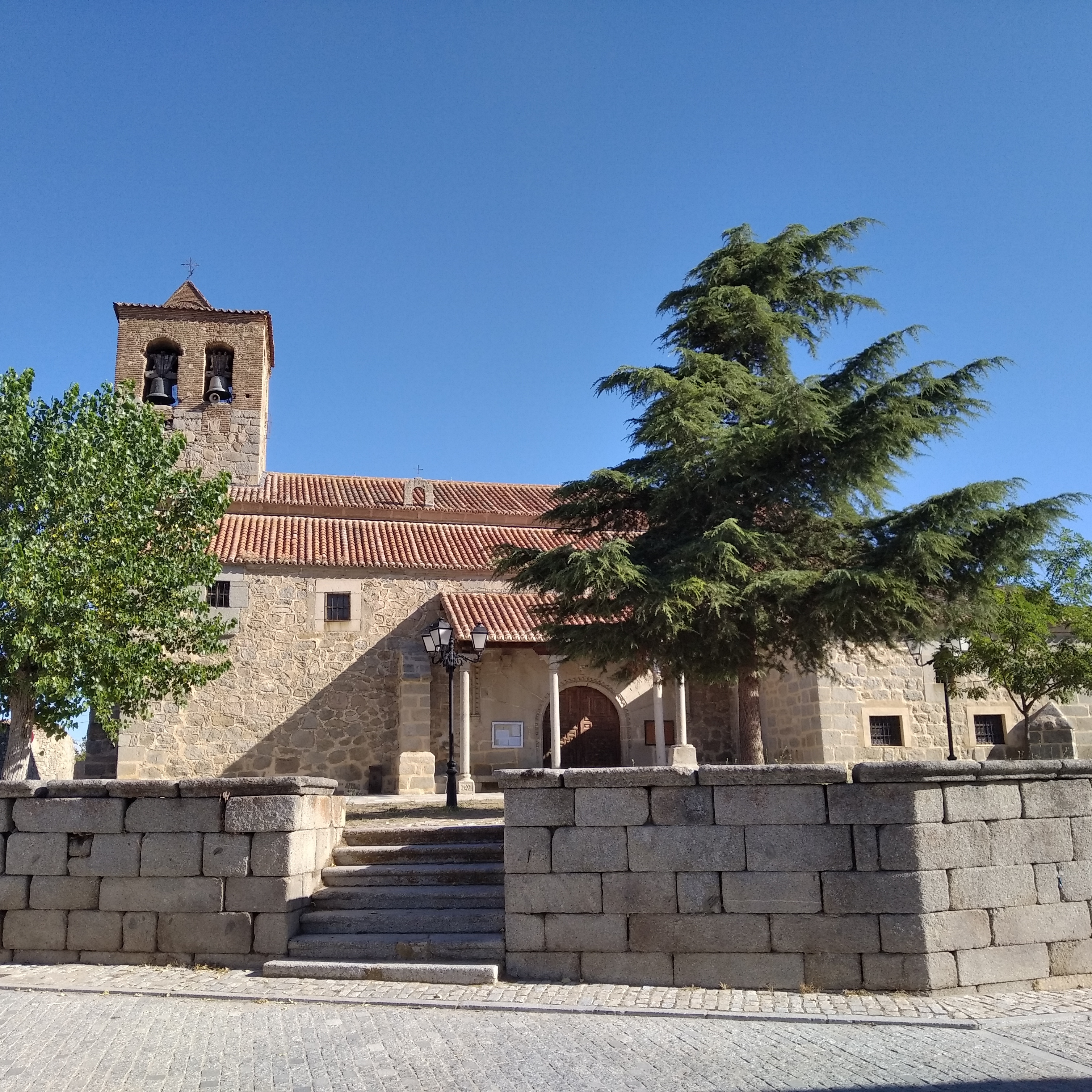 Foto del patio y entrada de la iglesia de la Invención de la Santa Cruz